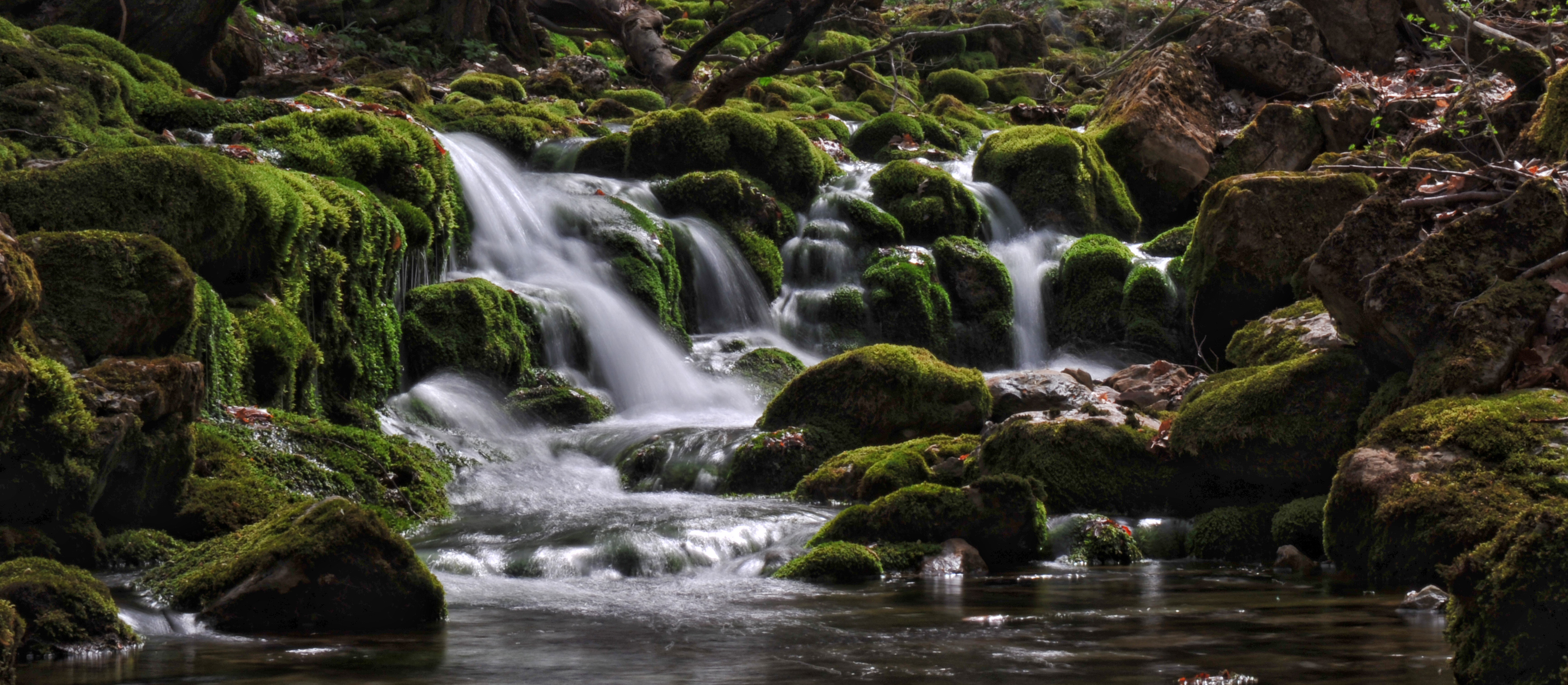 водоспадик у Великому каньйоні Криму